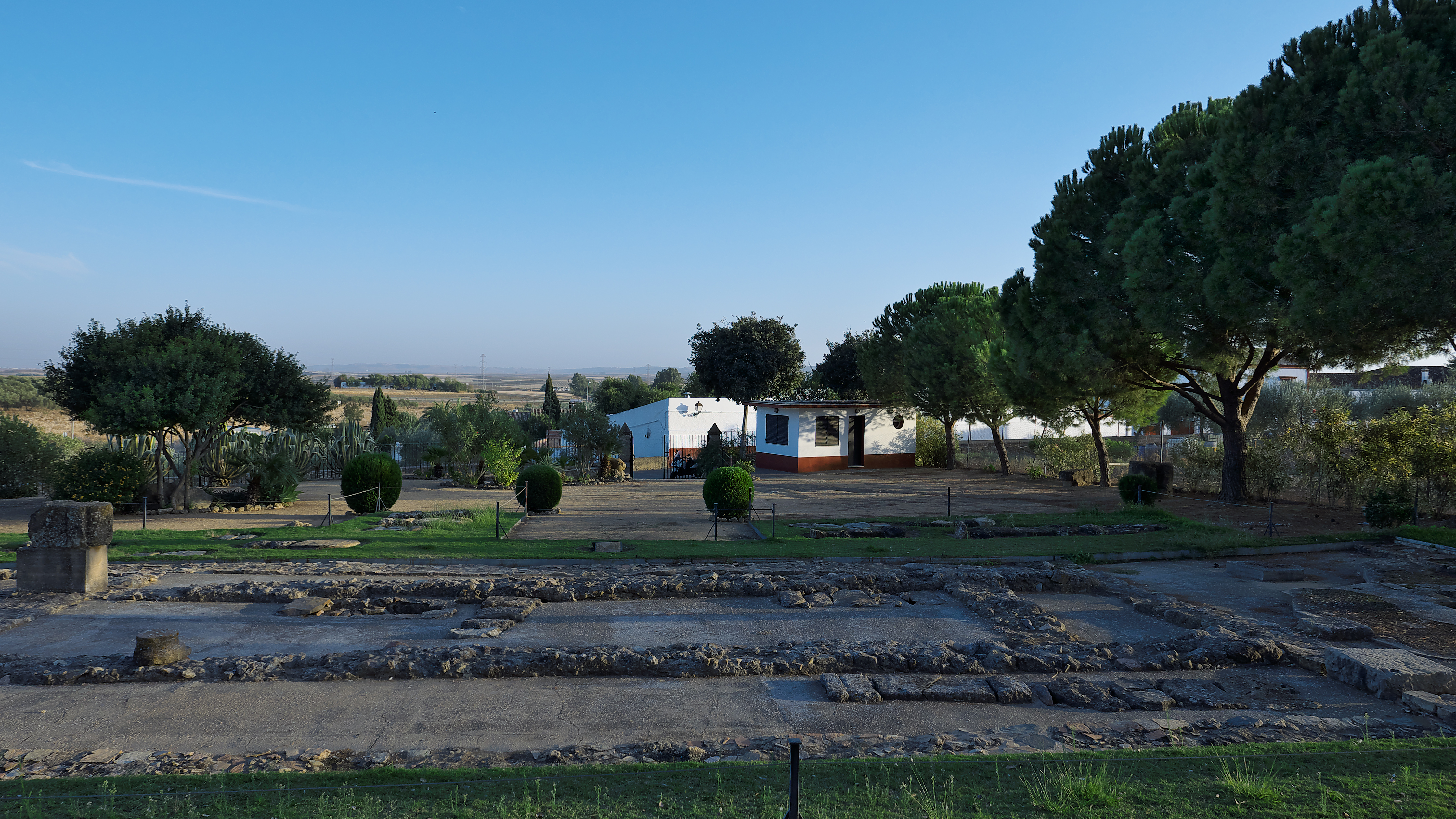 San Geroncio, primer obispo de la diócesis visigoda de Itálica. Dibujo hipotético de la Basílica Paleocristiana de Gerena